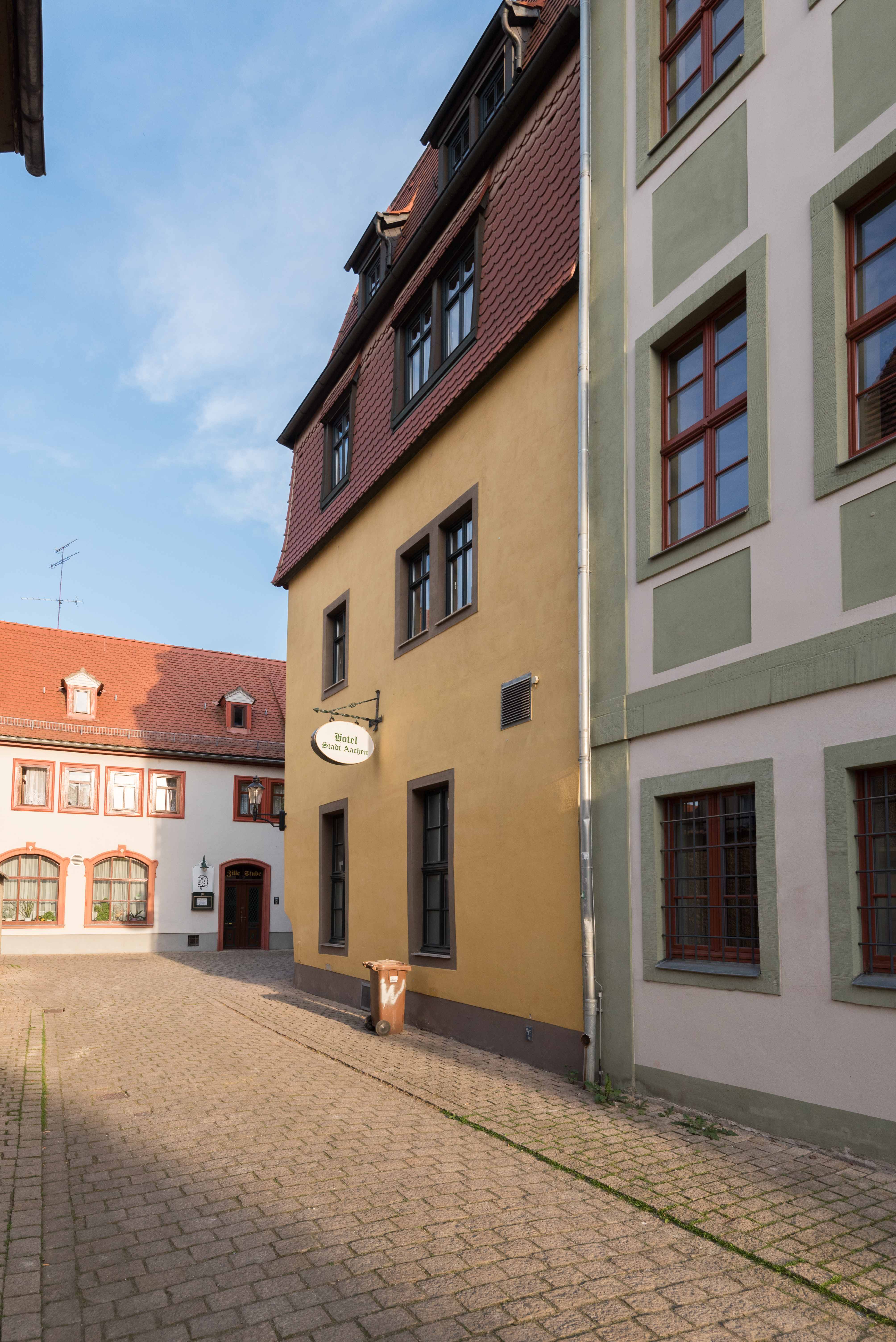 Naumburg (Saale), Mariengasse 15